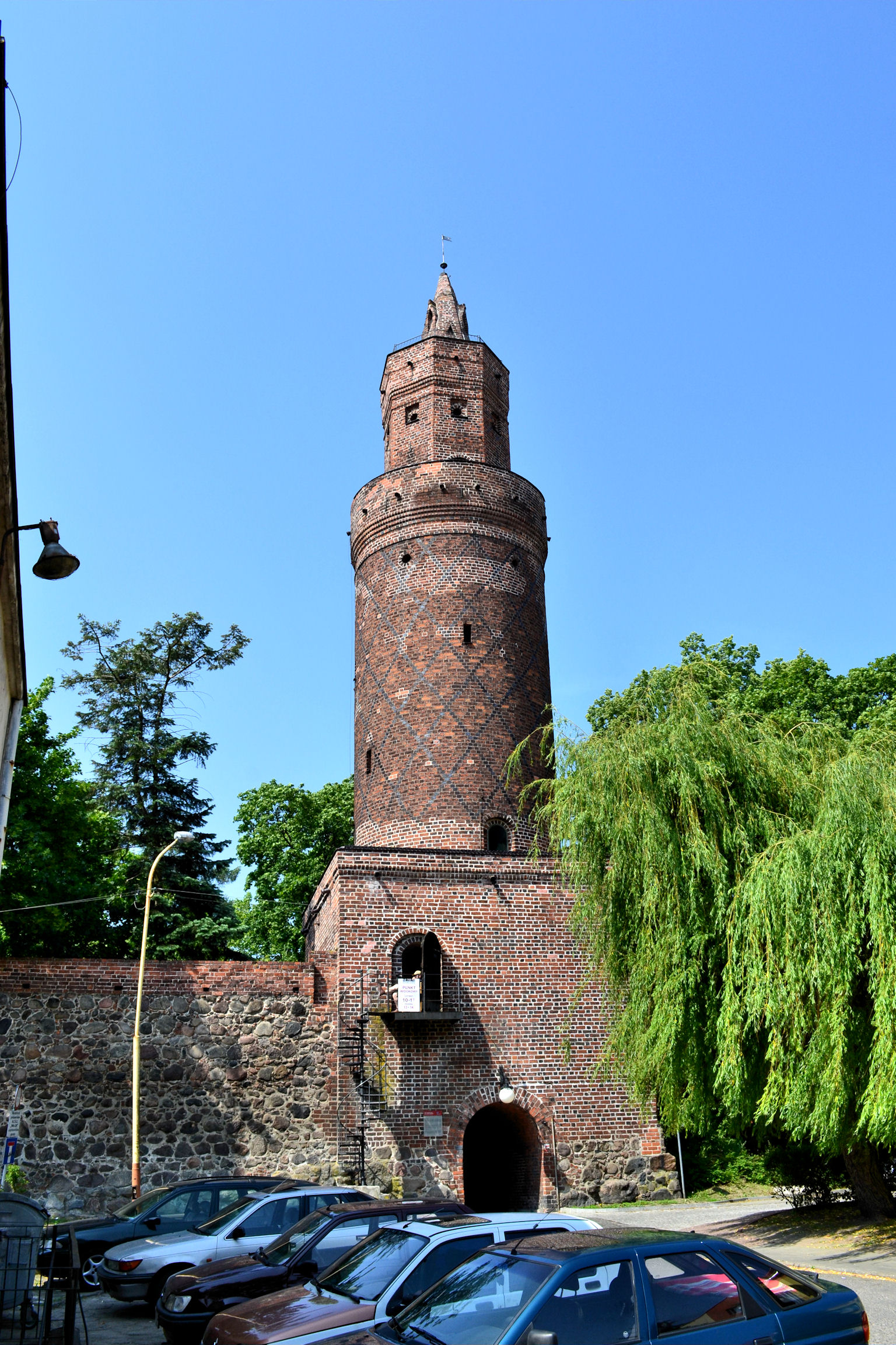 Baszta Morze Czerwone w Stargardzie Szczecińskim